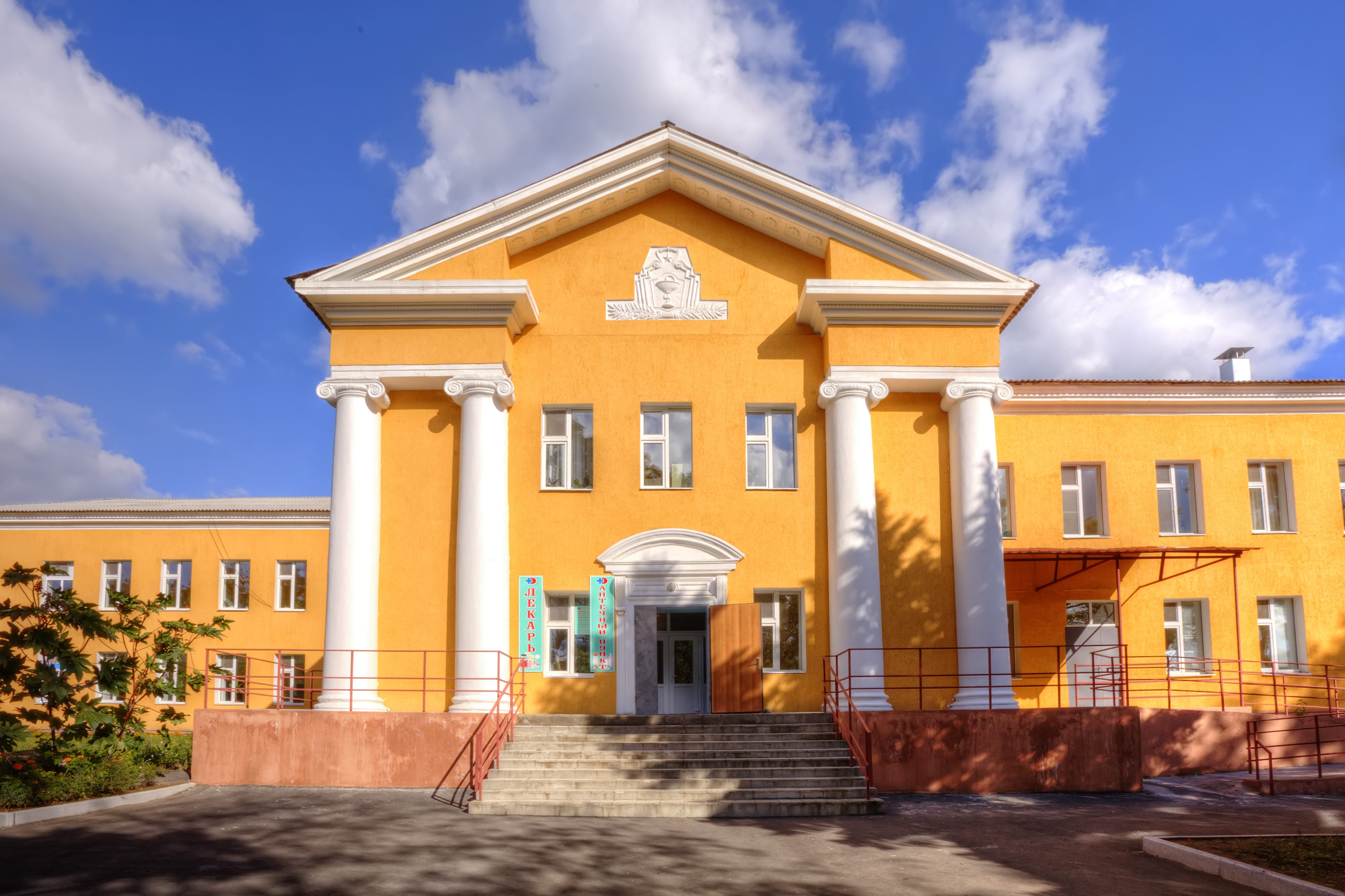 Будинок дитячої міської лікарні №2, Макіївка, вул. Кірова, 104